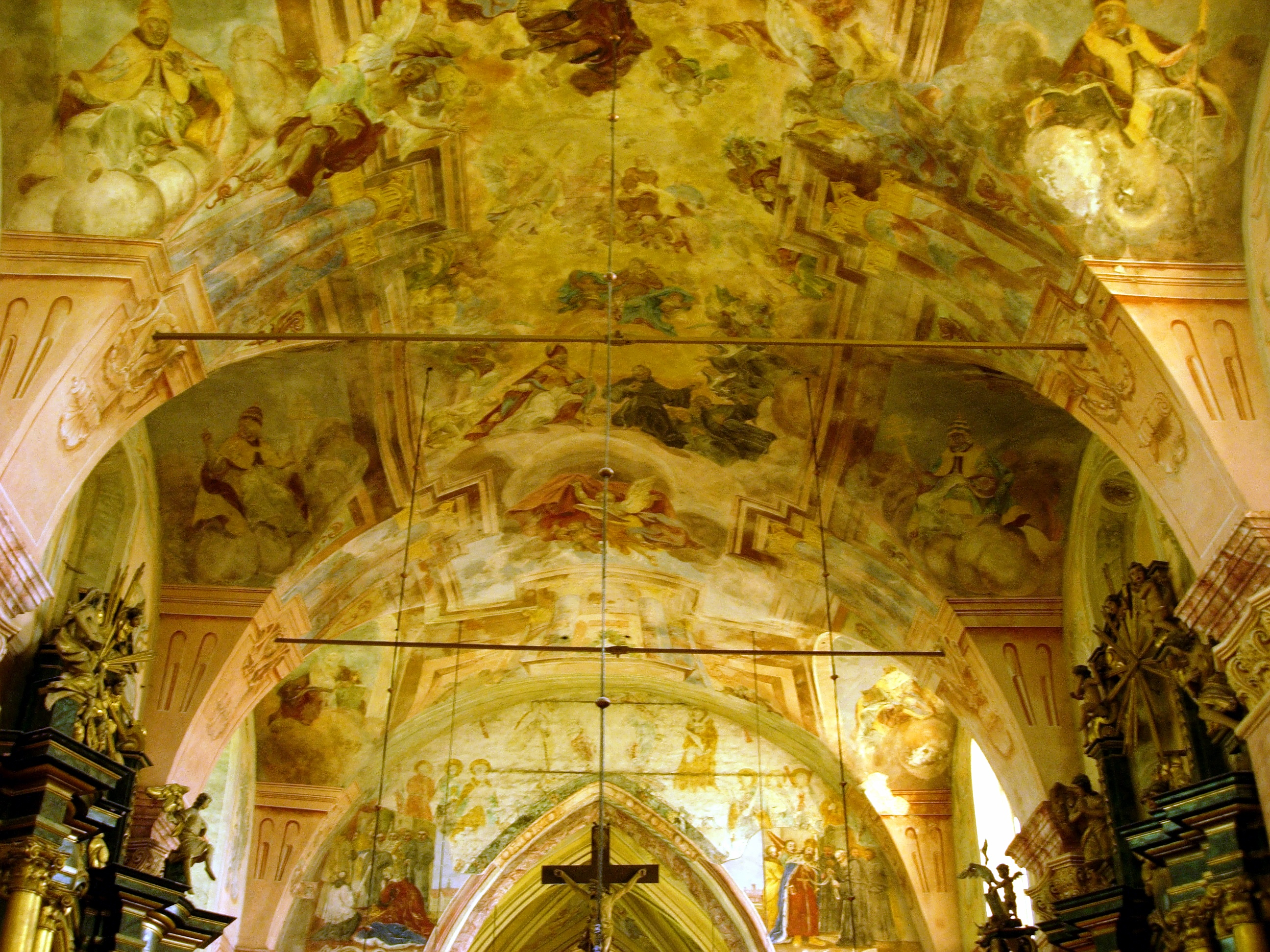 Sklepienie kościoła św. Stanisława w Nowym Korczynie